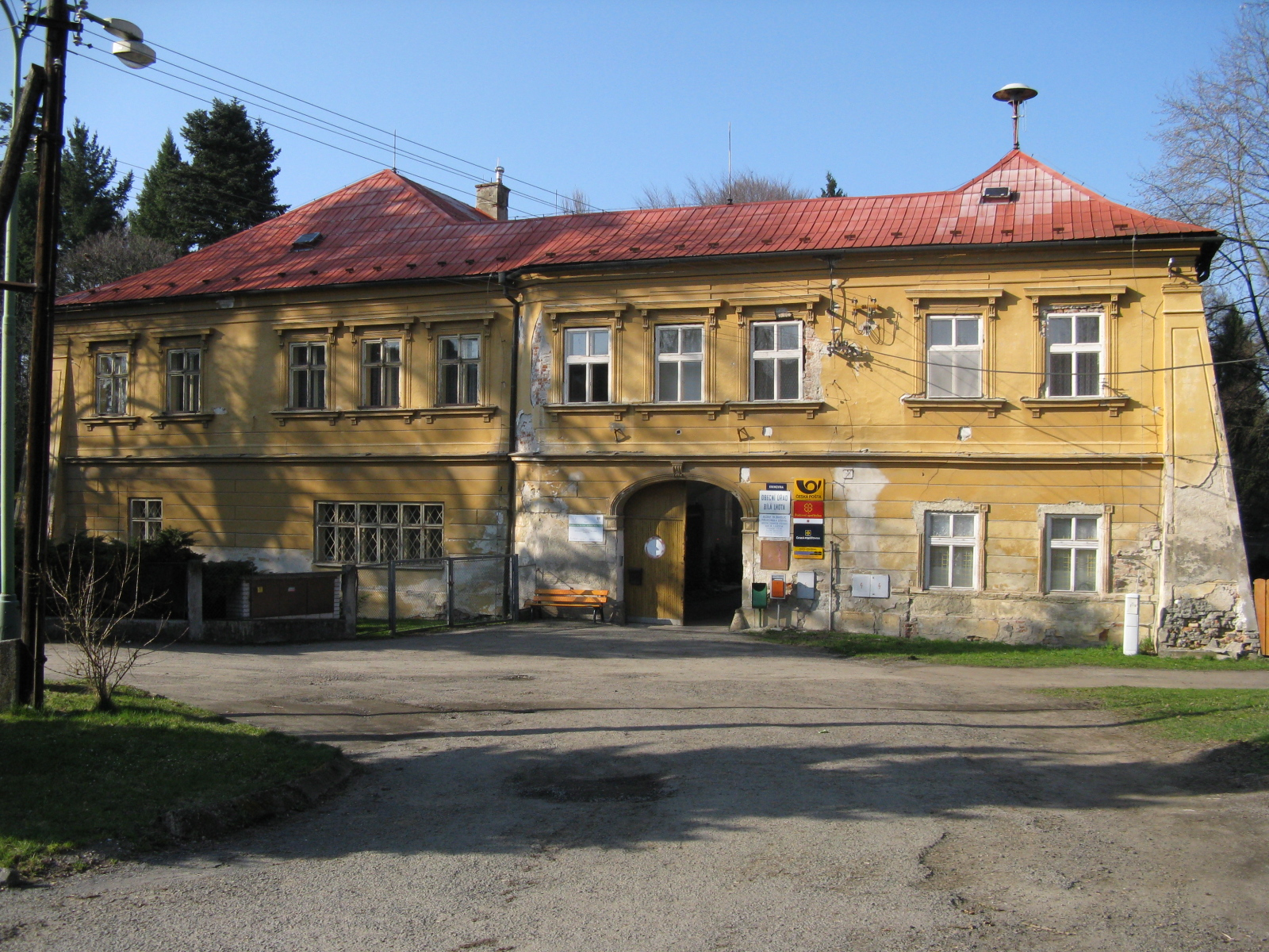 Zámek Bílá Lhota, okres Olomouc